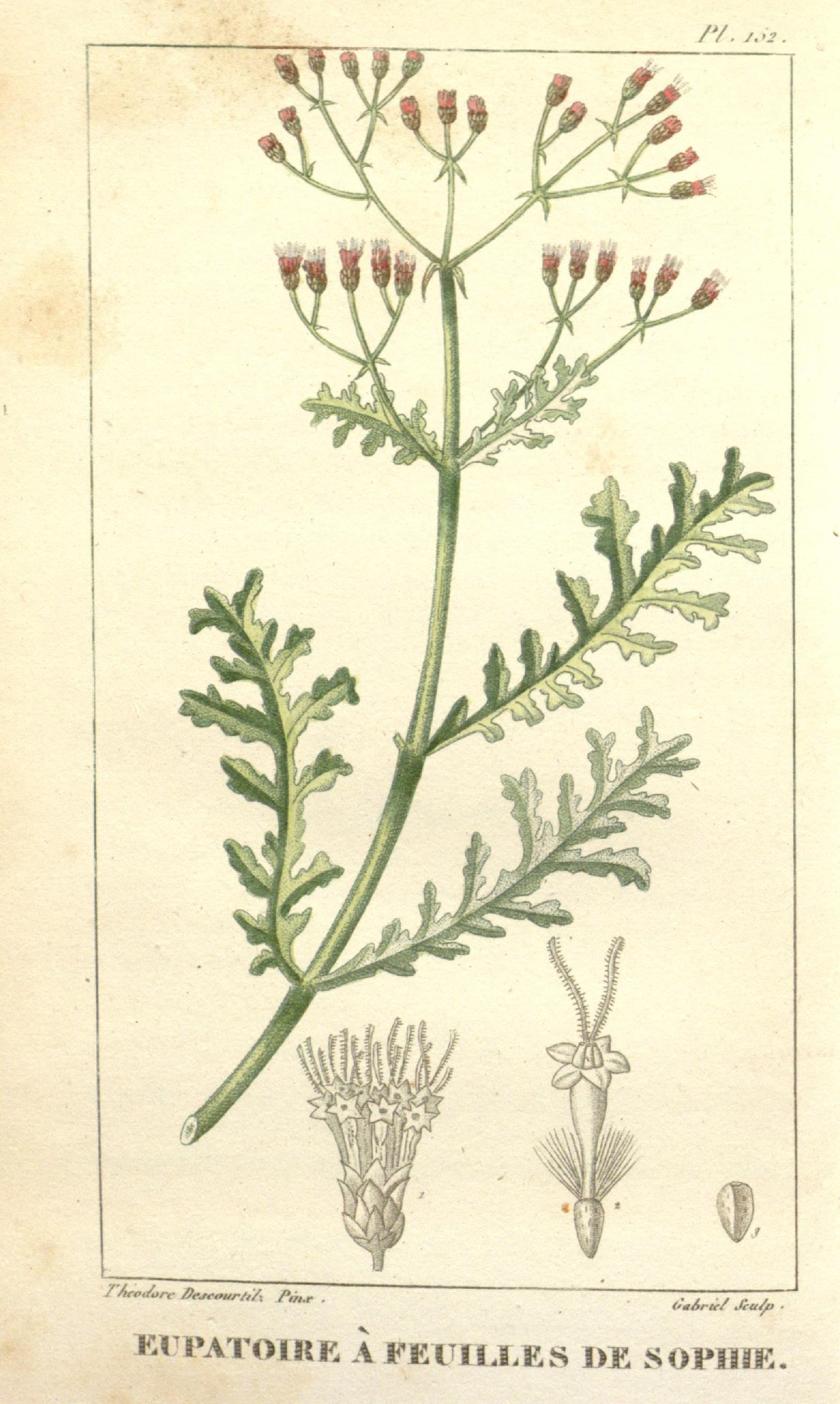 f- r /y. 7. ..' . 1 ^ 2'Aro^/ore Avrw//-///î A//.r ûmÂric/ ^fi-€i/n ' KlPATomE AFEXTÏIXES DE SOPIiïE.